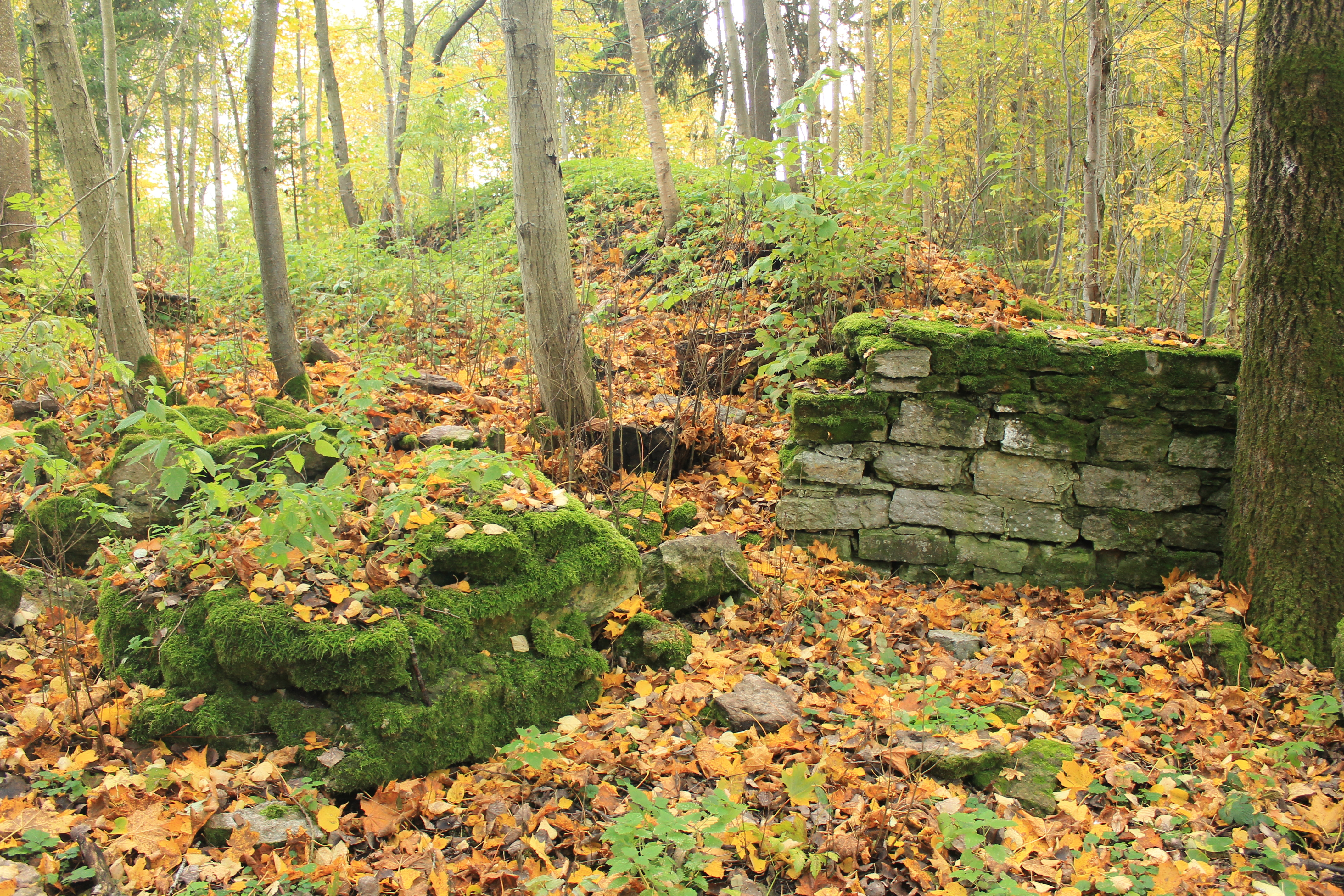 Руины Лбшанской крепости